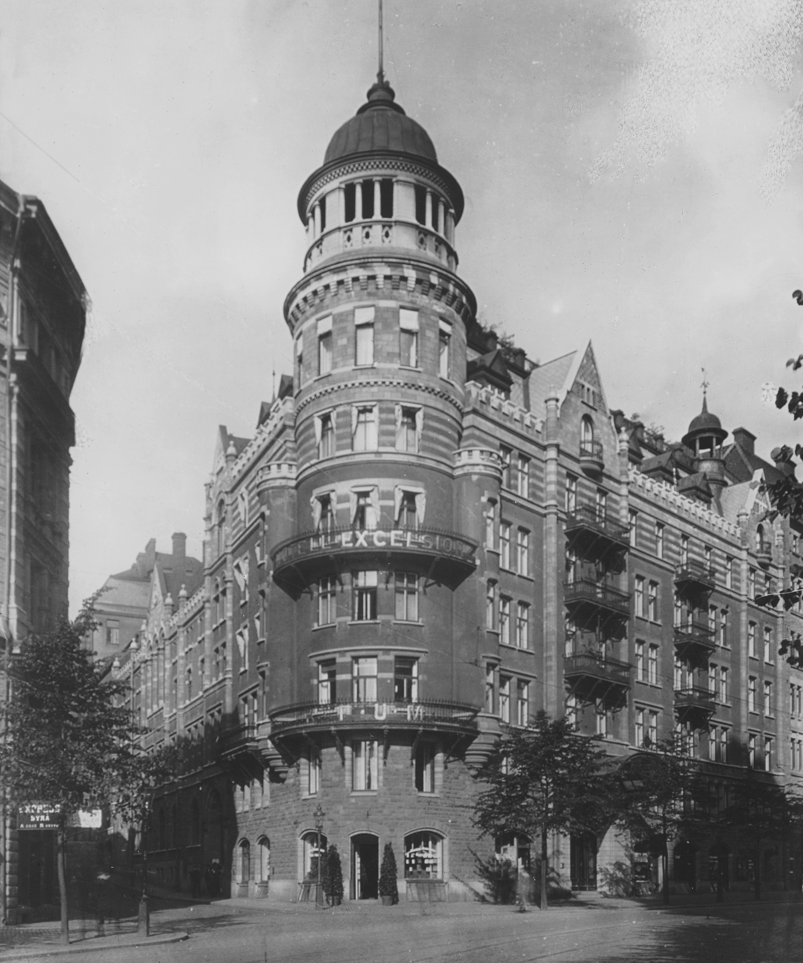 Hotell Excelsior, Birger Jarlsgatan (nuv. Hotel Crystal Plaza)